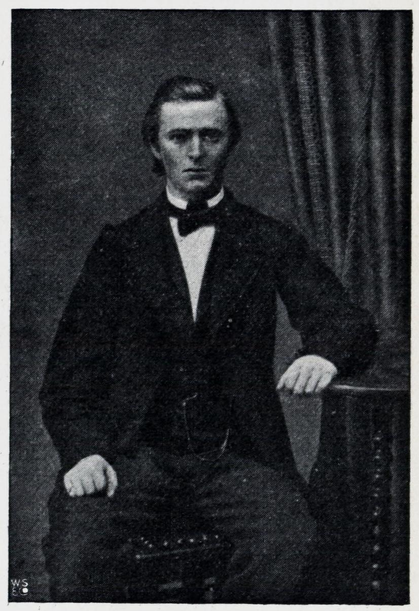 Illustrasjon hentet fra boken "En Christianiensers Erindringer fra 1850- og 60-Aarene" av Nielsen, Yngvar og utgitt av Gyldendal (Kristiania, 1910. Johan N.L.H. Vibe (1840-1897))